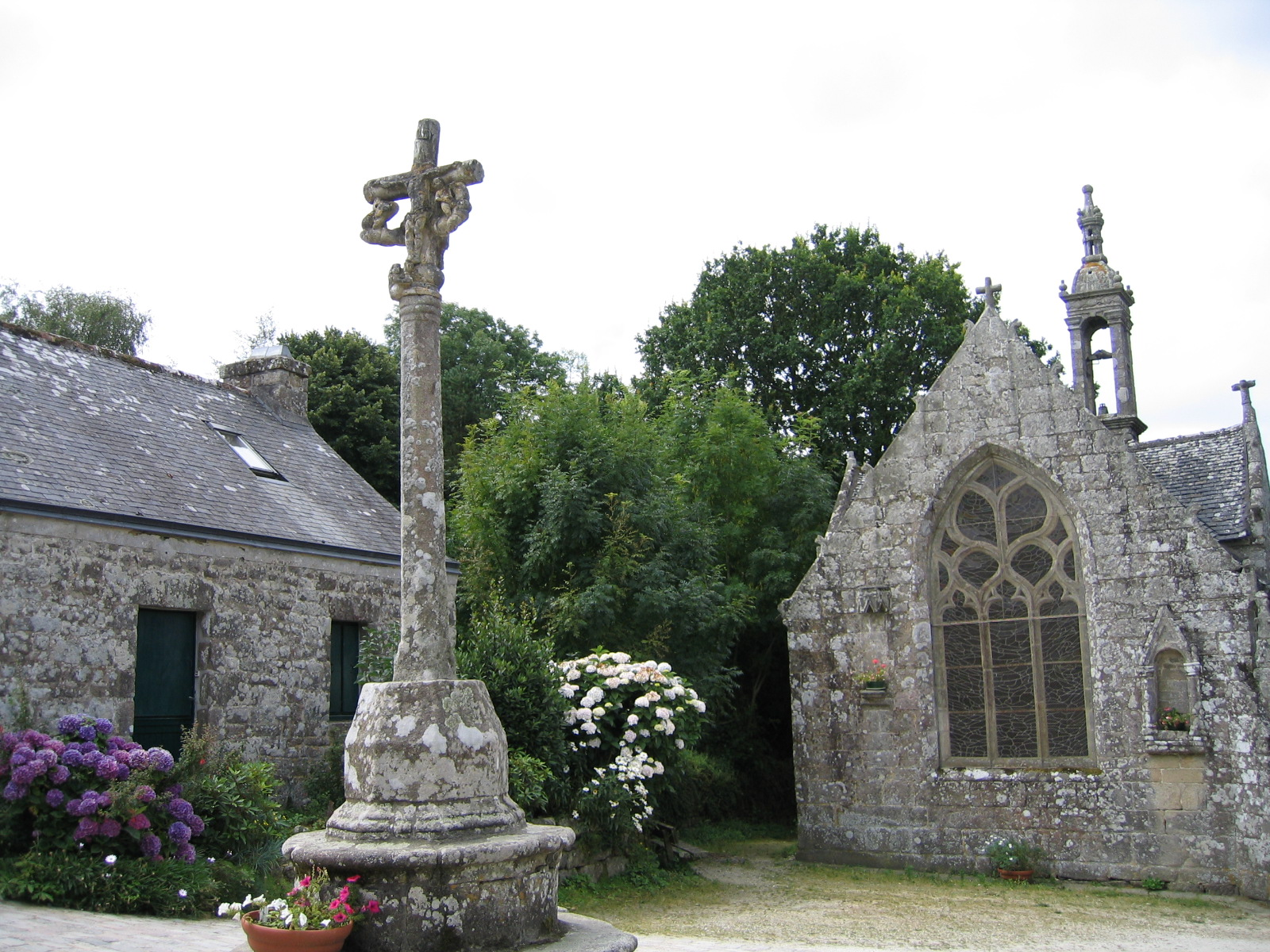 Chapelle, commune de Locronan, région Bretagne, France